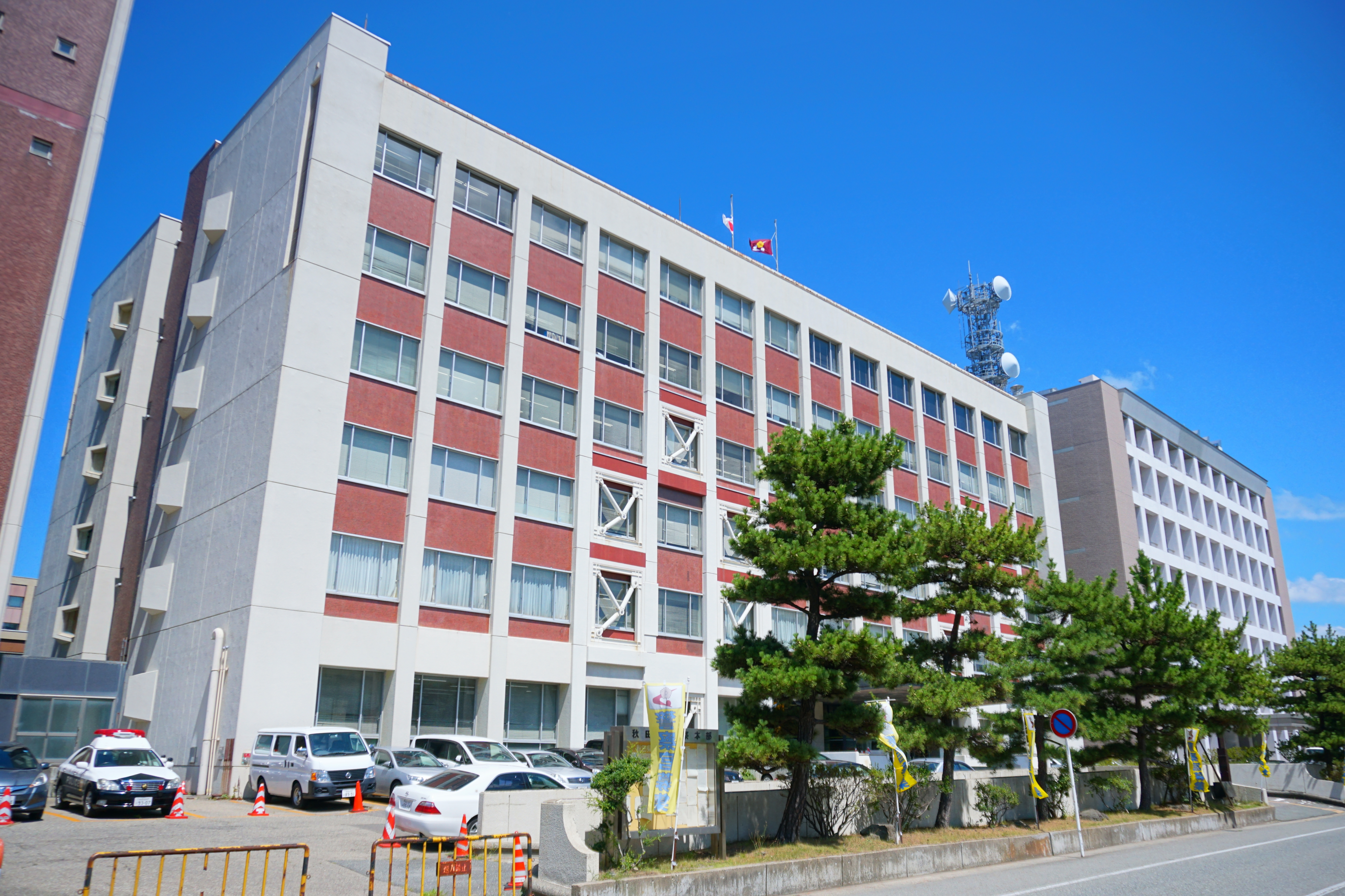 秋田県警察本部庁舎